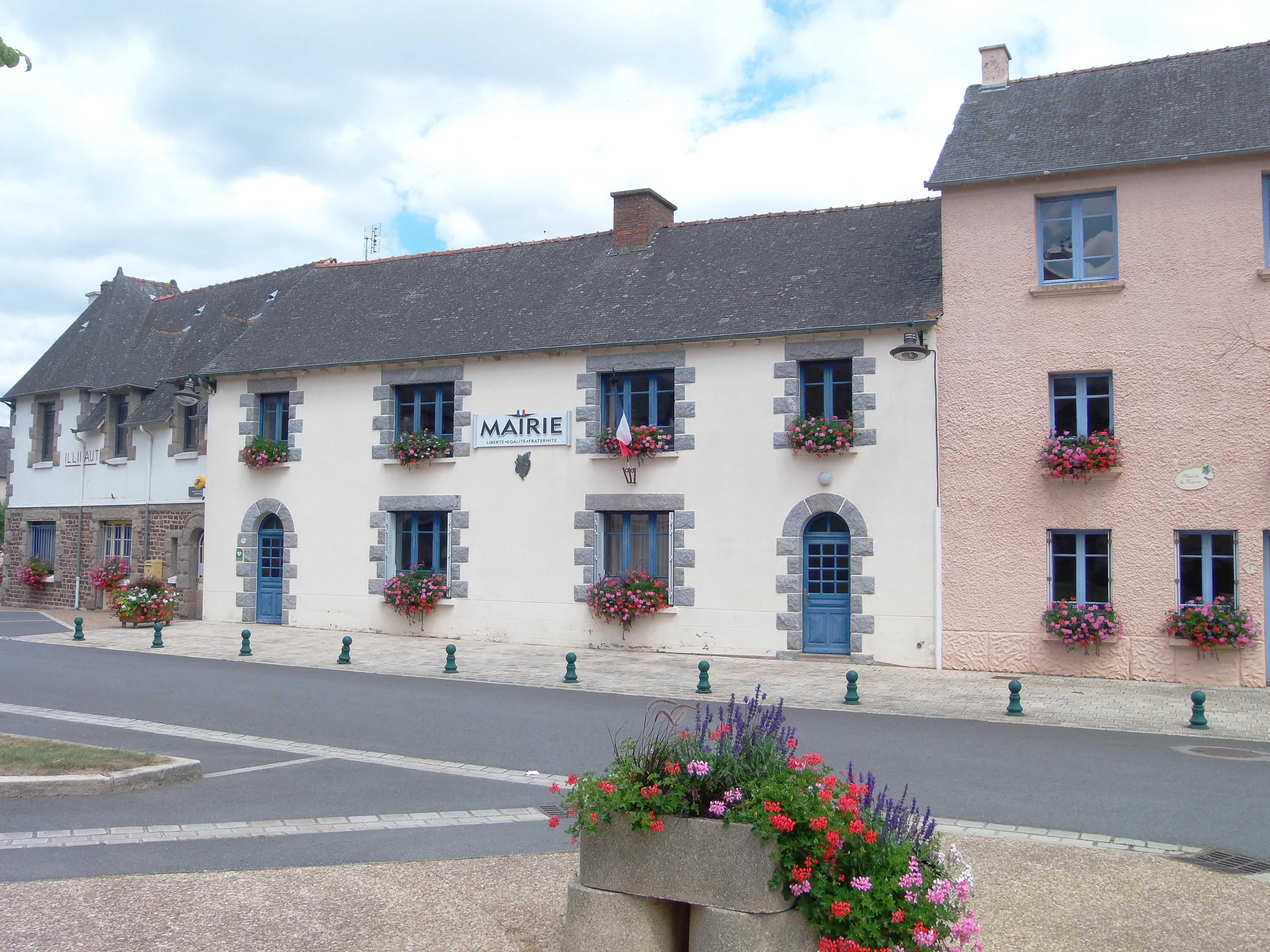 Façade de la Mairie d'Illifaut